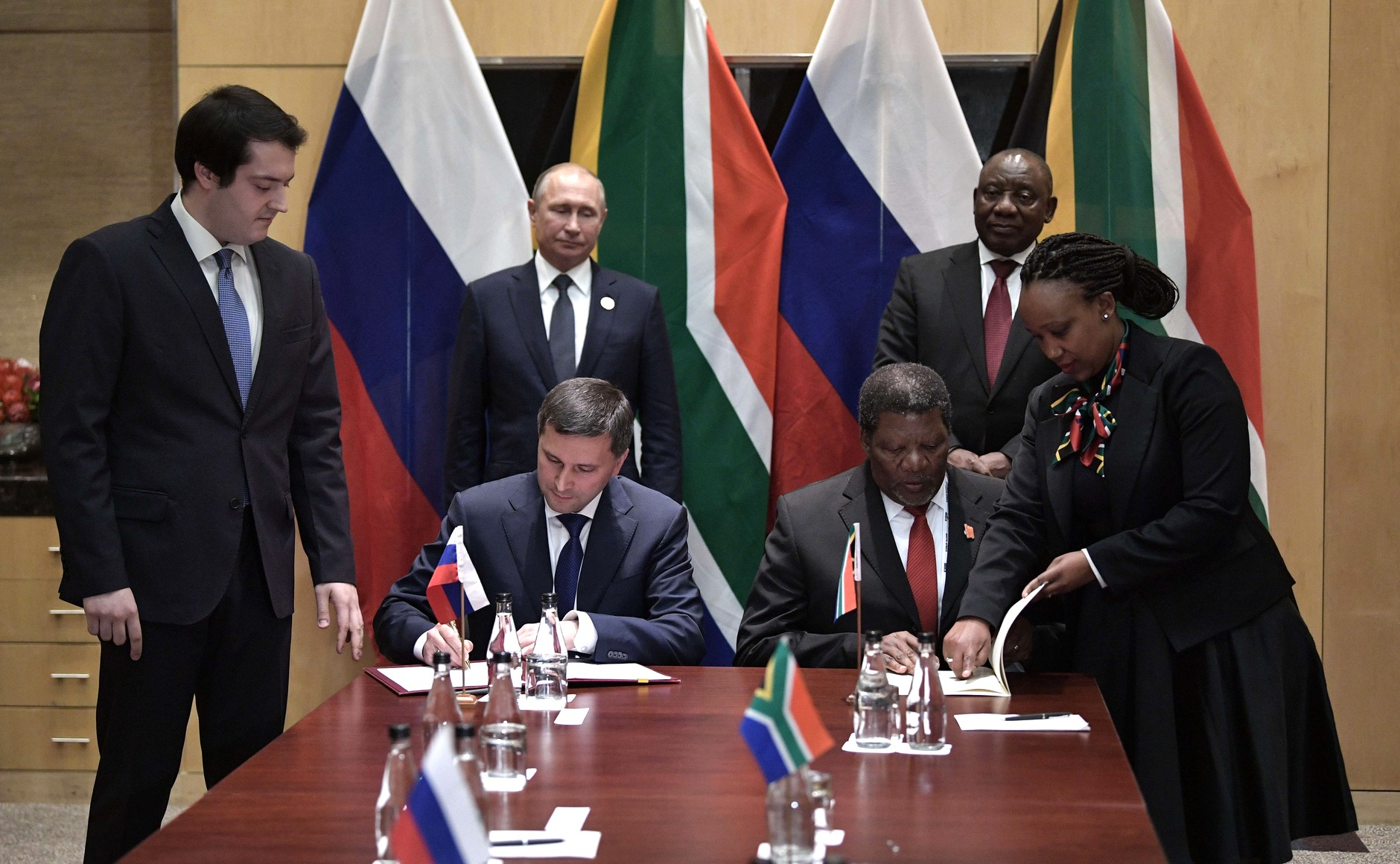 В присутствии глав государств также подписаны межправительственные документы – соглашение о сотрудничестве в области сельского хозяйства и меморандум о взаимопонимании о сотрудничестве в области водных ресурсов.